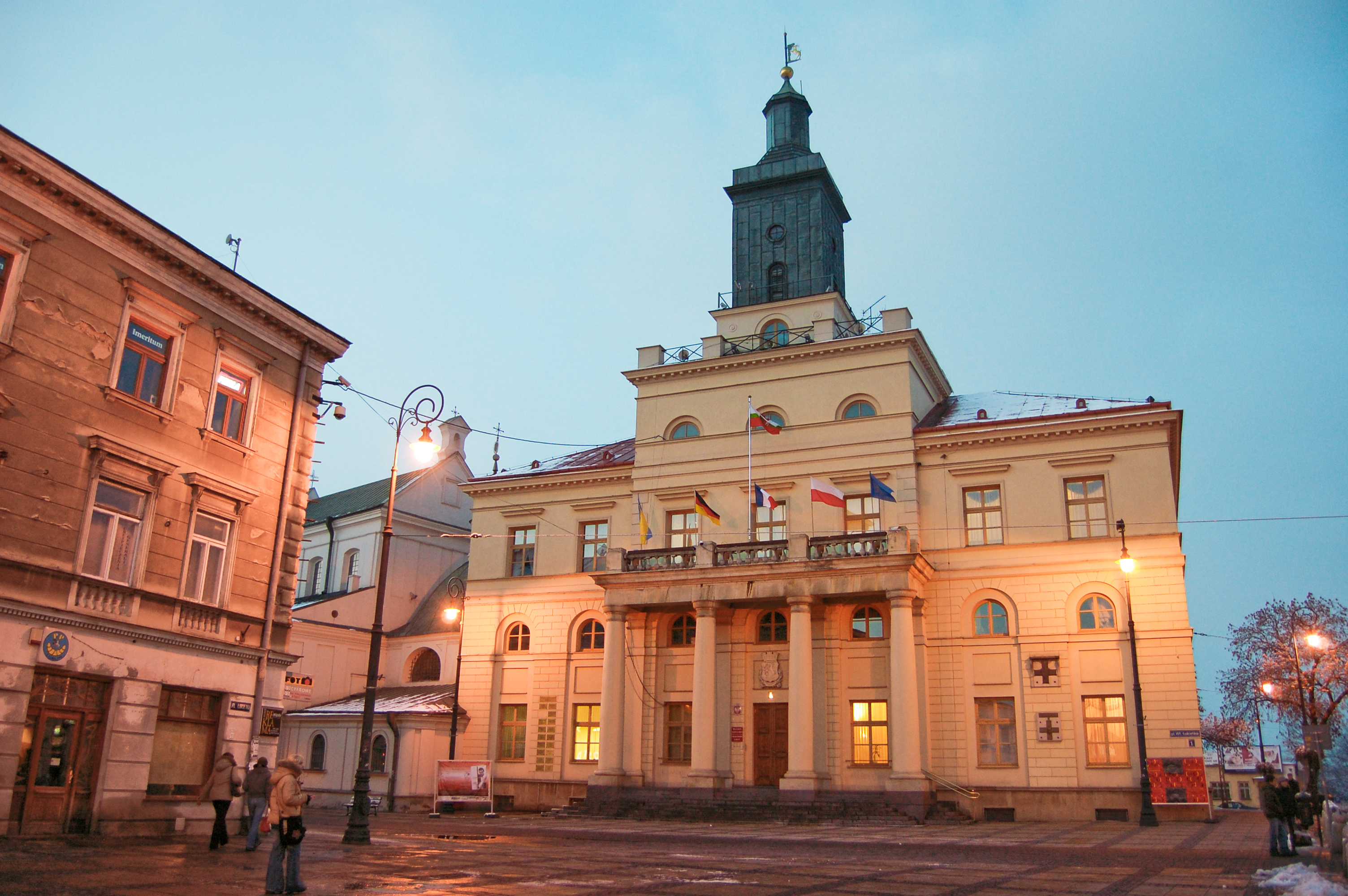 Nowy Ratusz w Lublinie.